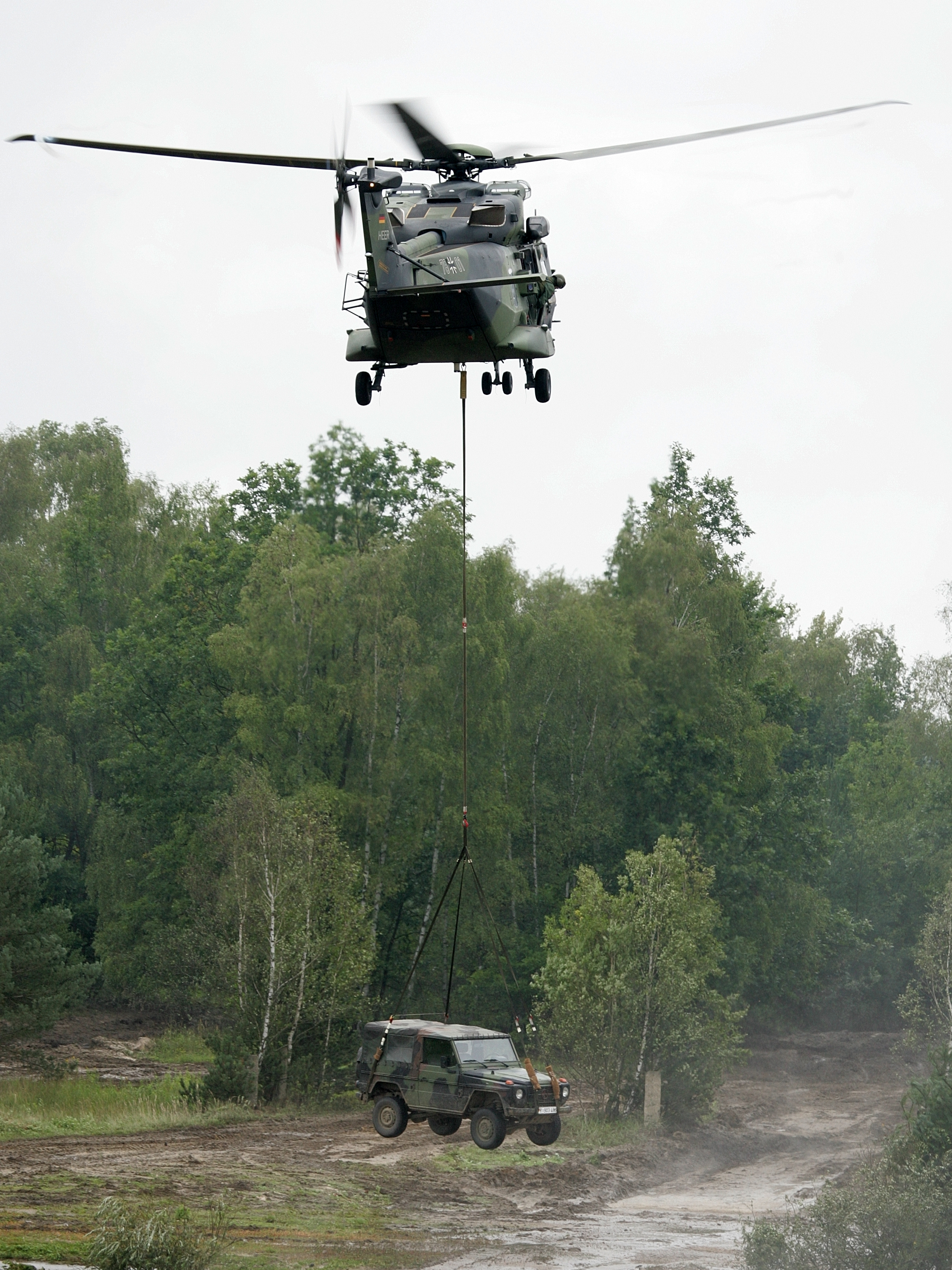 Mehrzweckhubschrauber NH90 mit Außenlast eines LKW leicht gl Wolf. Mit dem NH90 können sowohl schwere Lasten, technisches Material oder 20 Soldaten transportiert werden. Vorüben der Informationslehrübung Heer. Die Panzerlehrbrigade 9 stellt vom 4. bis 10. September die Fähigkeiten des deutschen Heeres auf dem Truppenübungsplätzen Munster und Bergen vor. Unterstützt wird die Lehrbrigade dabei vom Ausbildungszentrum Munster. In diesem Jahr wird das heutige und zukünftige Aufgabenspektrum des deutschen Heeres in dieser Lehrübung dargestellt. Die Informationslehrübung richtet sich in erster Linie an den Führernachwuchs der Bundeswehr, der Offizierschule des Heeres und Soldaten ausländischer Streitkräfte. ©Bundeswehr/Mandt